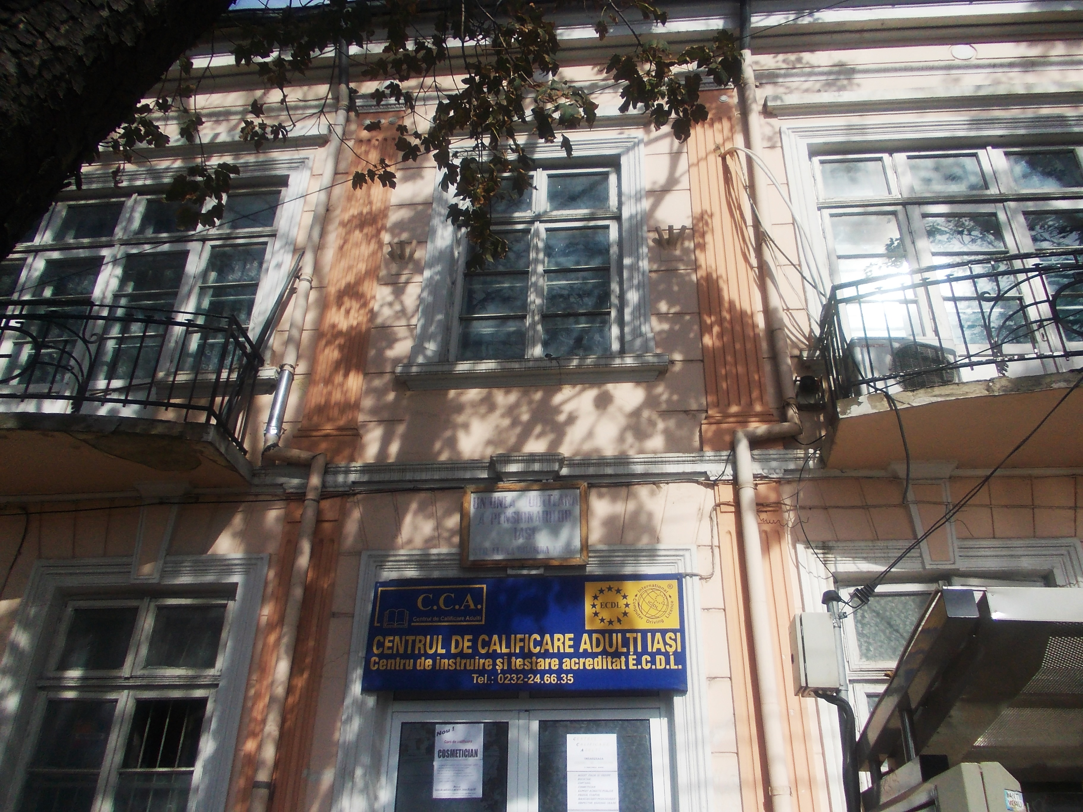 municipiul Iași, Str. Elena Doamna 37